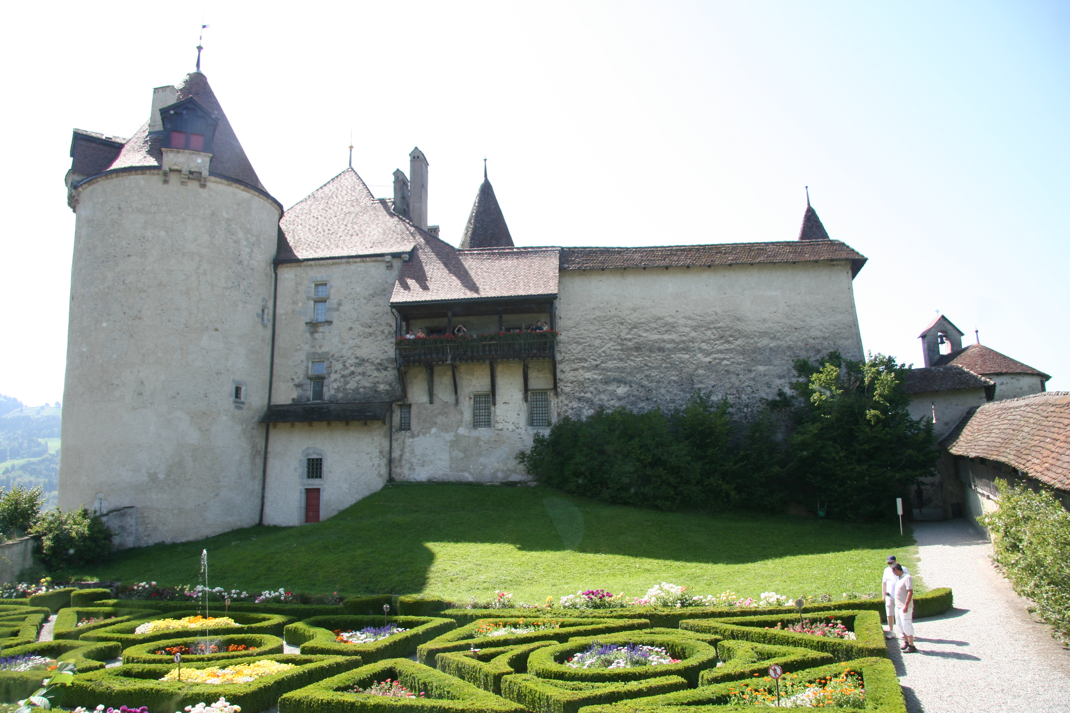 Château des comtes de Gruyère - Fribourg - Rue du Château 10